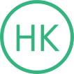 阪急京都本線・千里線・嵐山線の路線記号。DejaVuフォントで作成